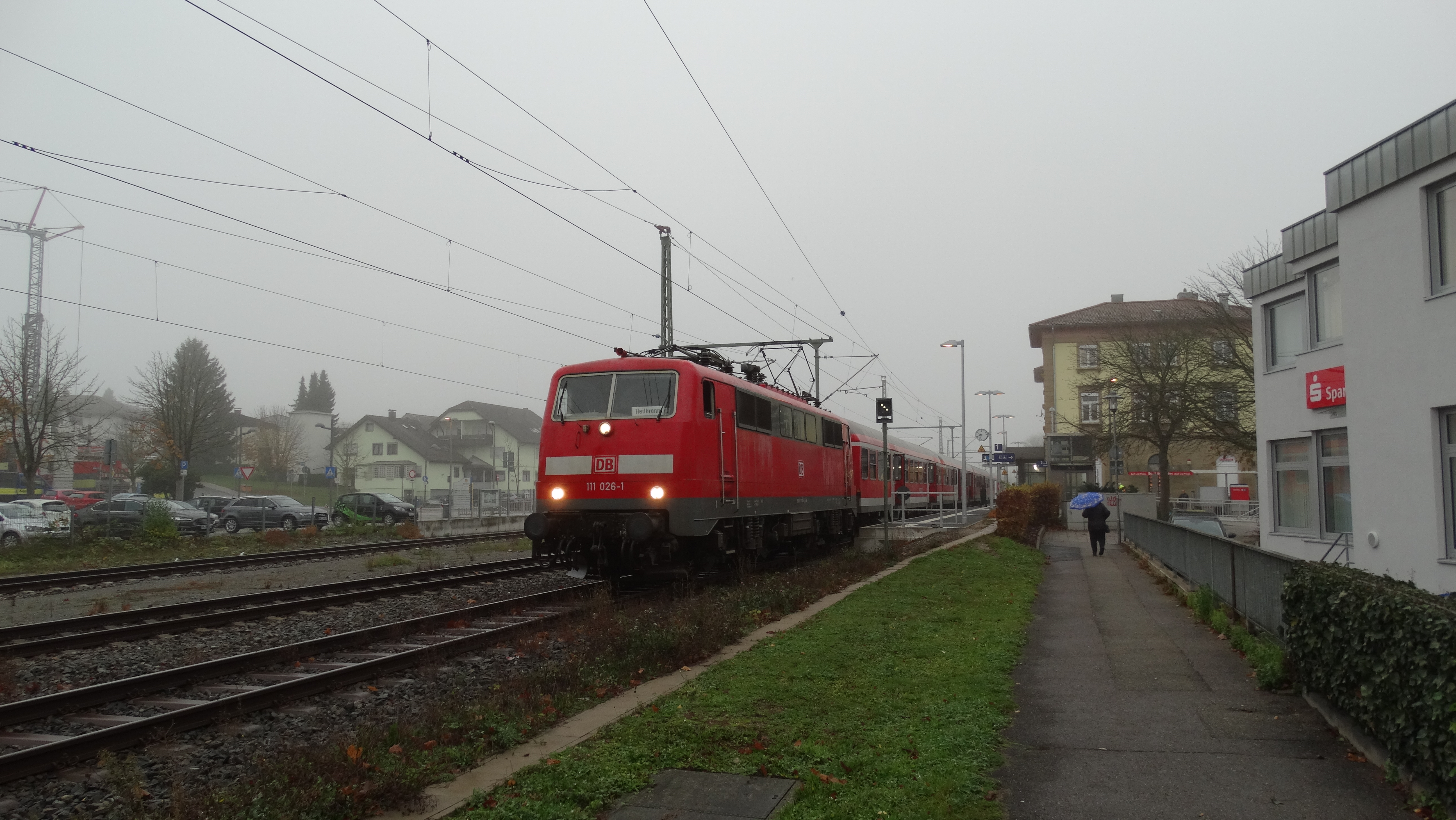 Der RE 12303 macht am 9. November 2017 Halt in Bad Rappenau. Dieser Zug fährt durchgebunden von Mainz nach Heilbronn, zwischen Mannheim und Heilbronn als RE 2.